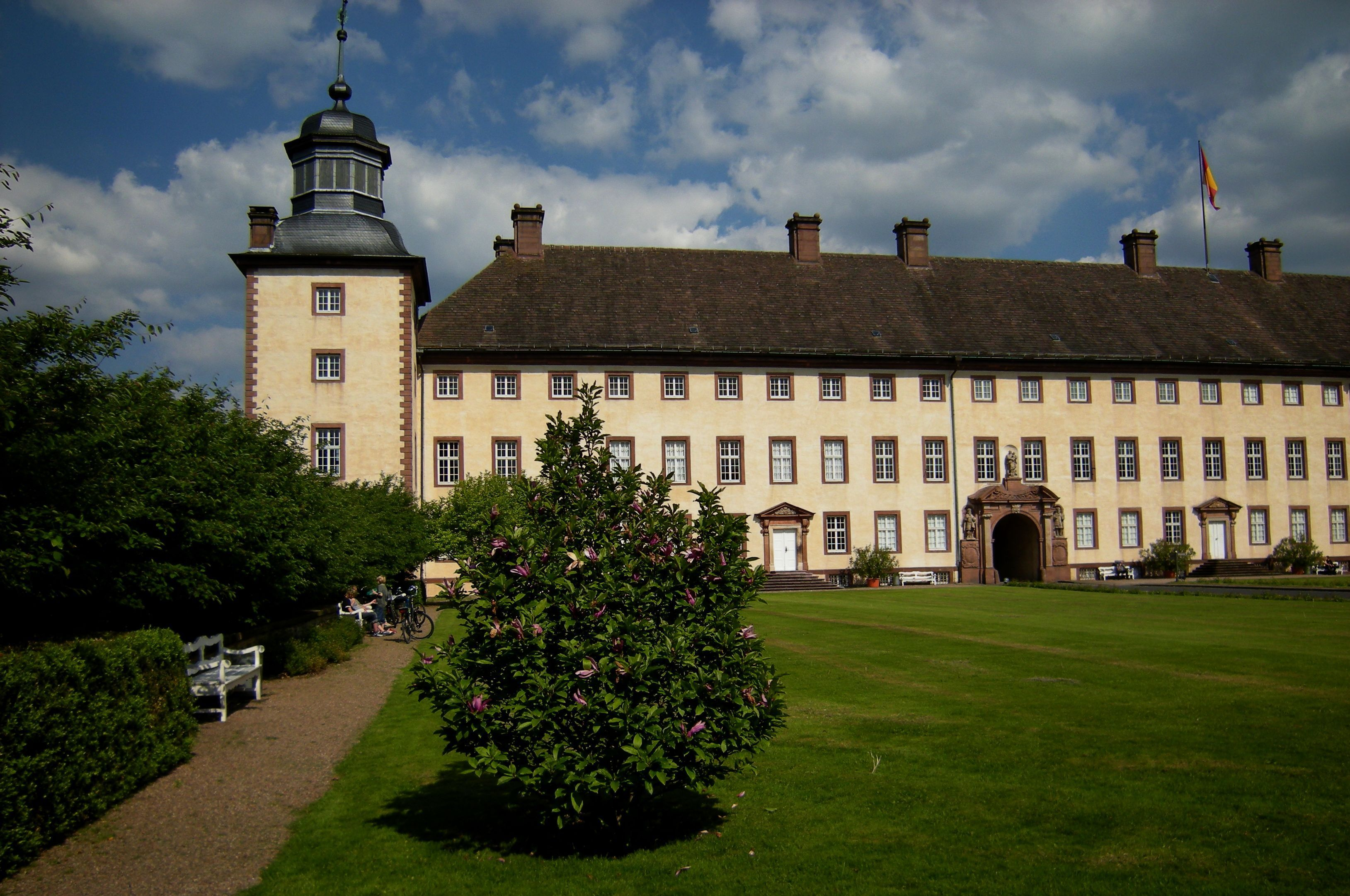 Höxter-Kloster Corvey.jpg